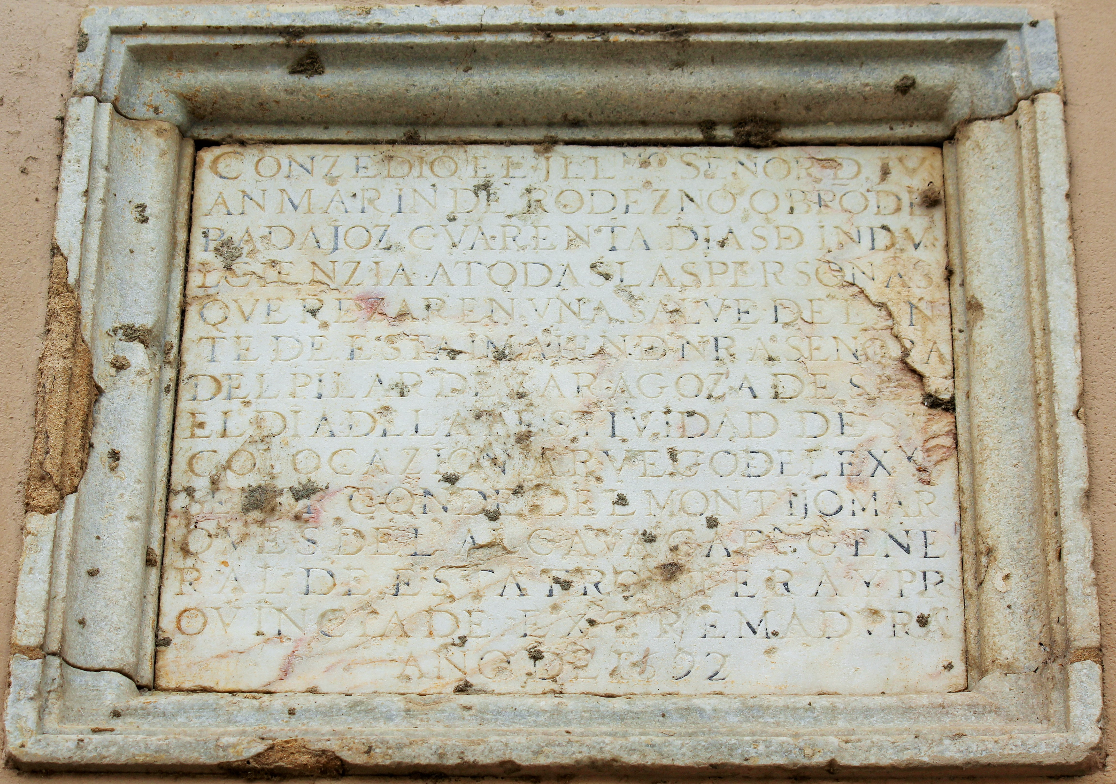 Placa conmemorativa-1